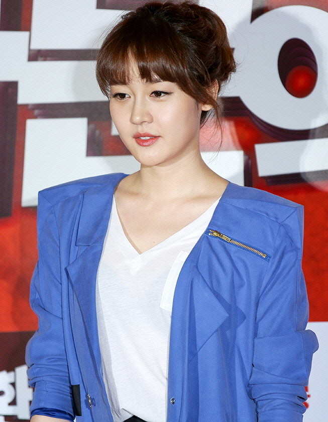 121217 가문의 귀환 시사회 성유리 직찍